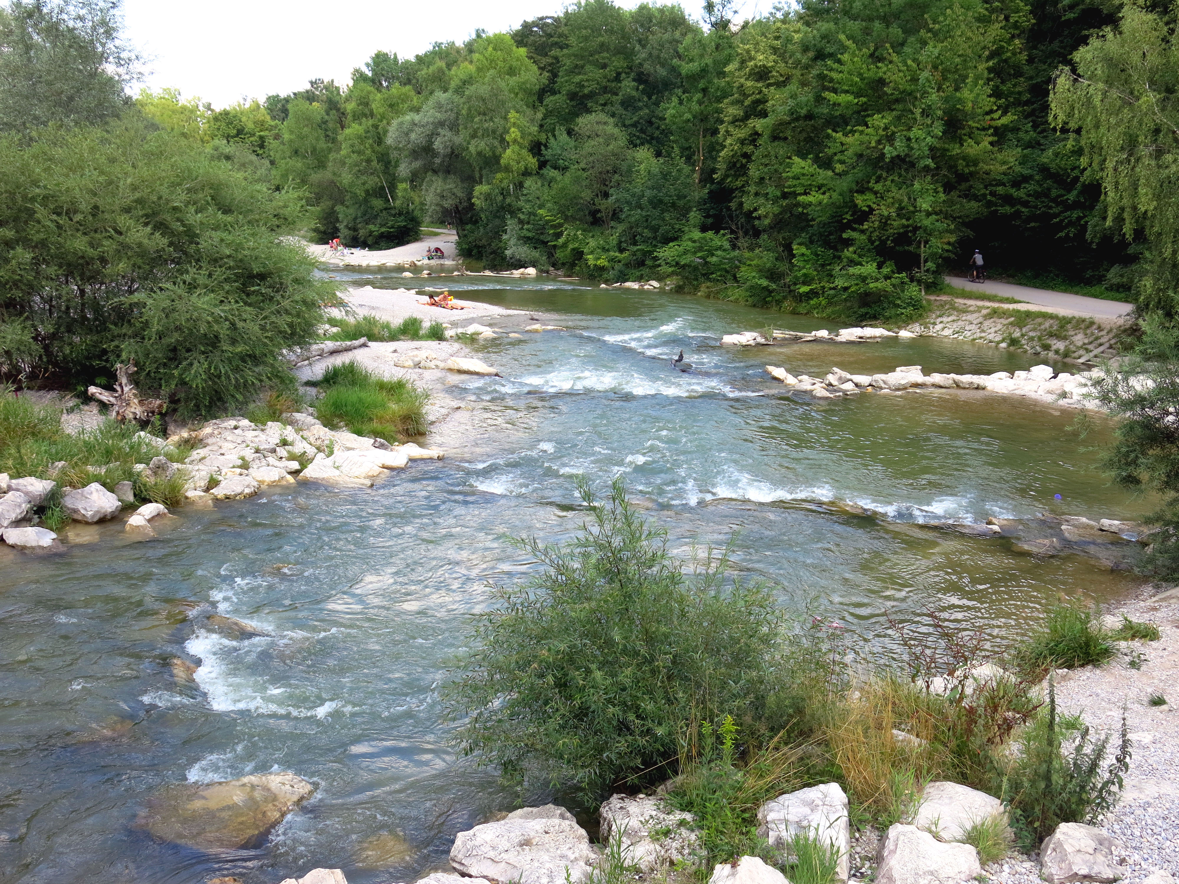 Renaturierte Isar im Süden Münchens